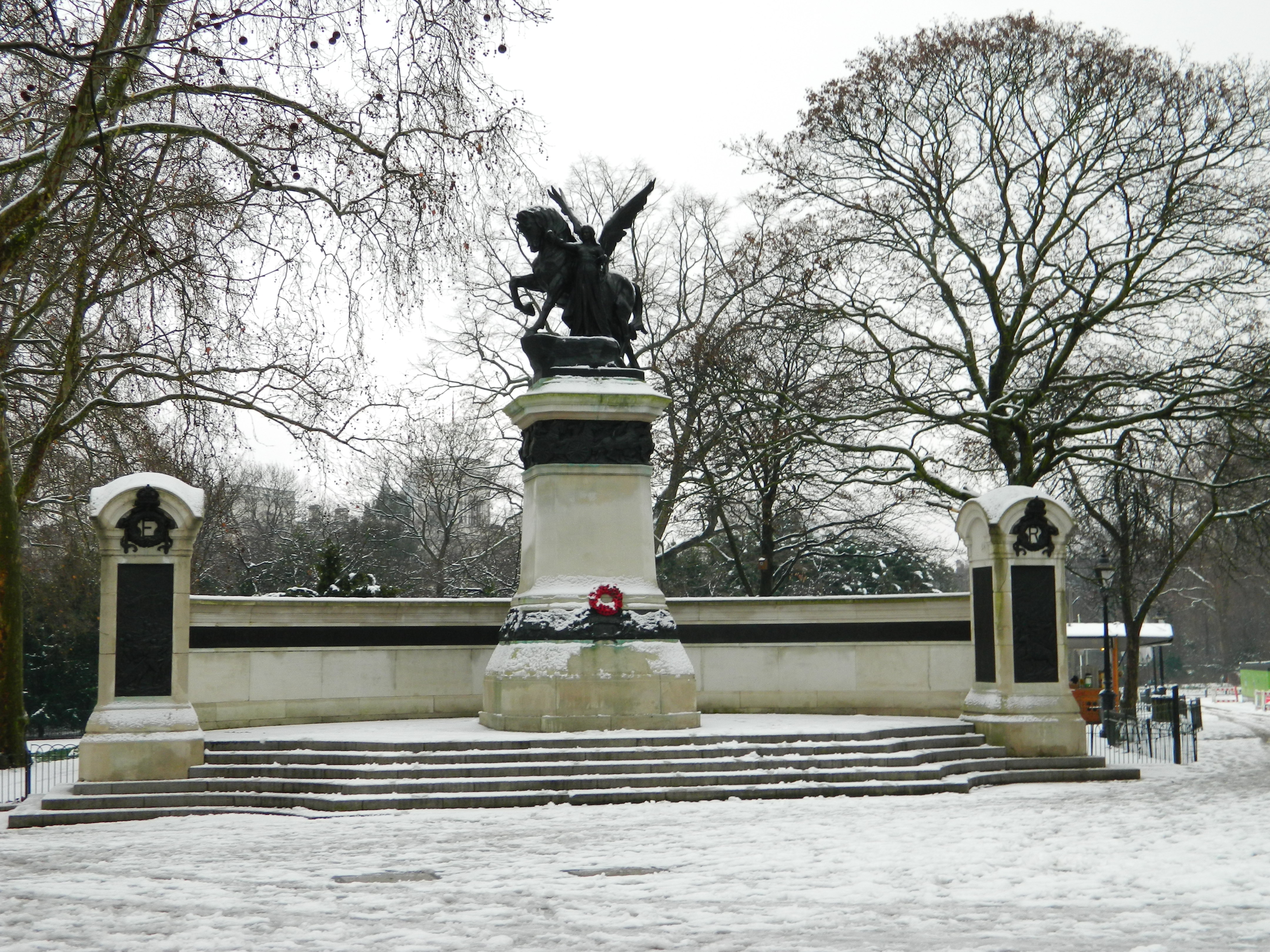 London